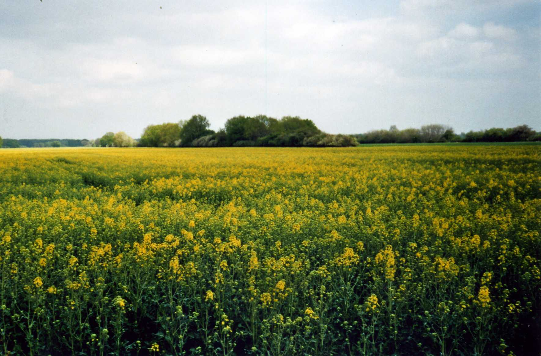 Typische Landschaft in der Wische zwischen Seehausen und Werben, Sachsen-Anhalt